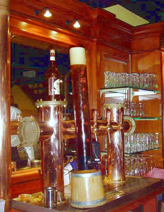 Une bière de Bruxelles dans une girafe.